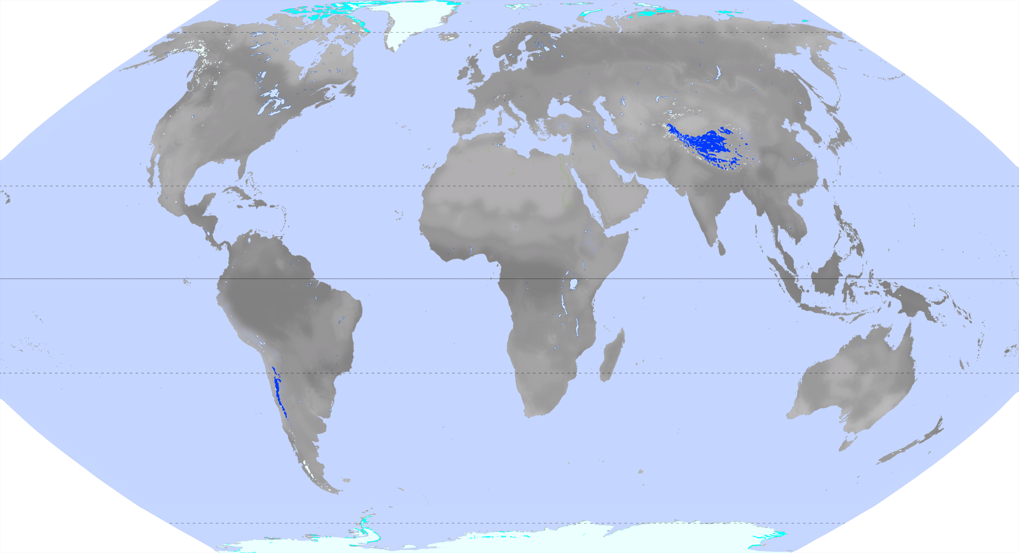 === quellen == Auszug der Wikimedia-Karte Vegetationszonen.png, ebenfalls mein eigenes Werk kartographie Eckert VI-Projektion (nahezu flächentreu, realistische Größenverhältnisse, relativ wenig verzerrt), erstellt mit (Lizenz CC-BY) datengrundlagen → siehe: Literaturangaben der Originalkarte legende (german) Die verwendeten Farben entsprechen nicht der Legende der Originalkarte! Die Modifikation wurde vorgenommen, um die Erkennbarkeit der Flächen auf der Vorschaukarte zu erhöhen. Eisschilde Polare Kältewüste Alpine Kältewüste